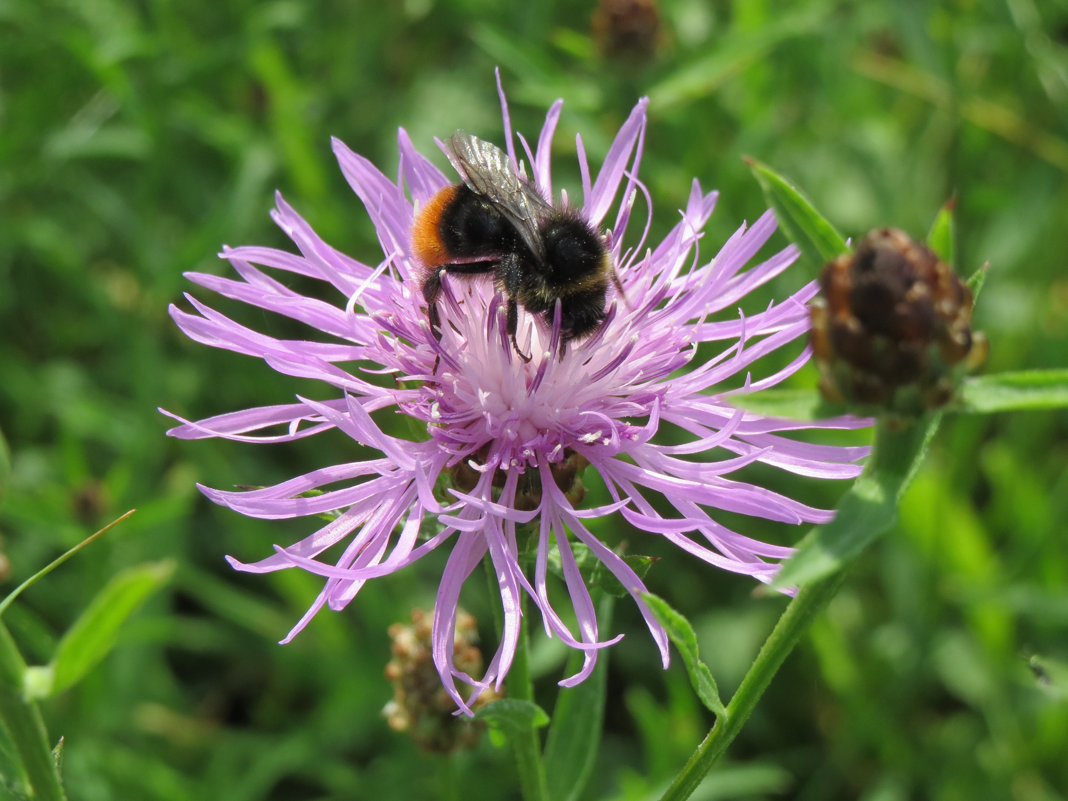 Wiesen-Flockenblume (Centaurea jacea) bei Hockenheim